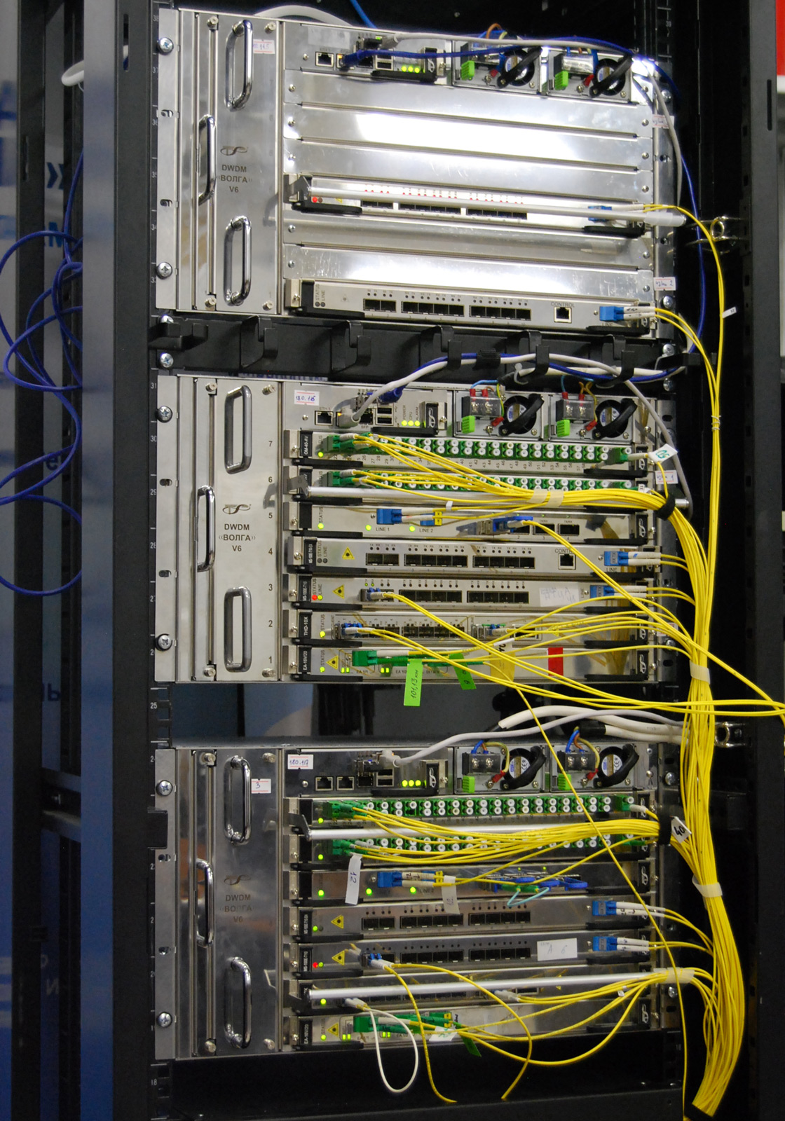 DWDM equipment in rack